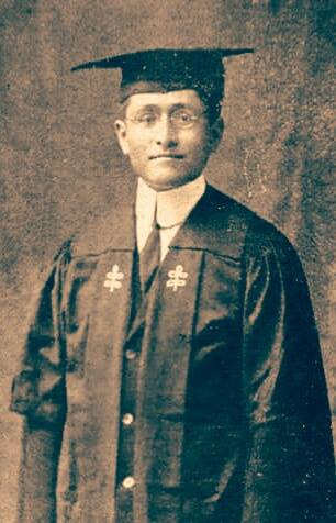 Julio César Tello, arqueólogo peruano (Universidad Nacional Mayor de San Marcos, Universidad de Harvard).